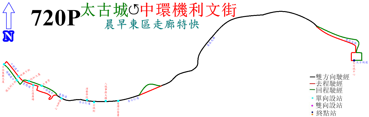 中文（香港）: 新巴720P線的走線圖